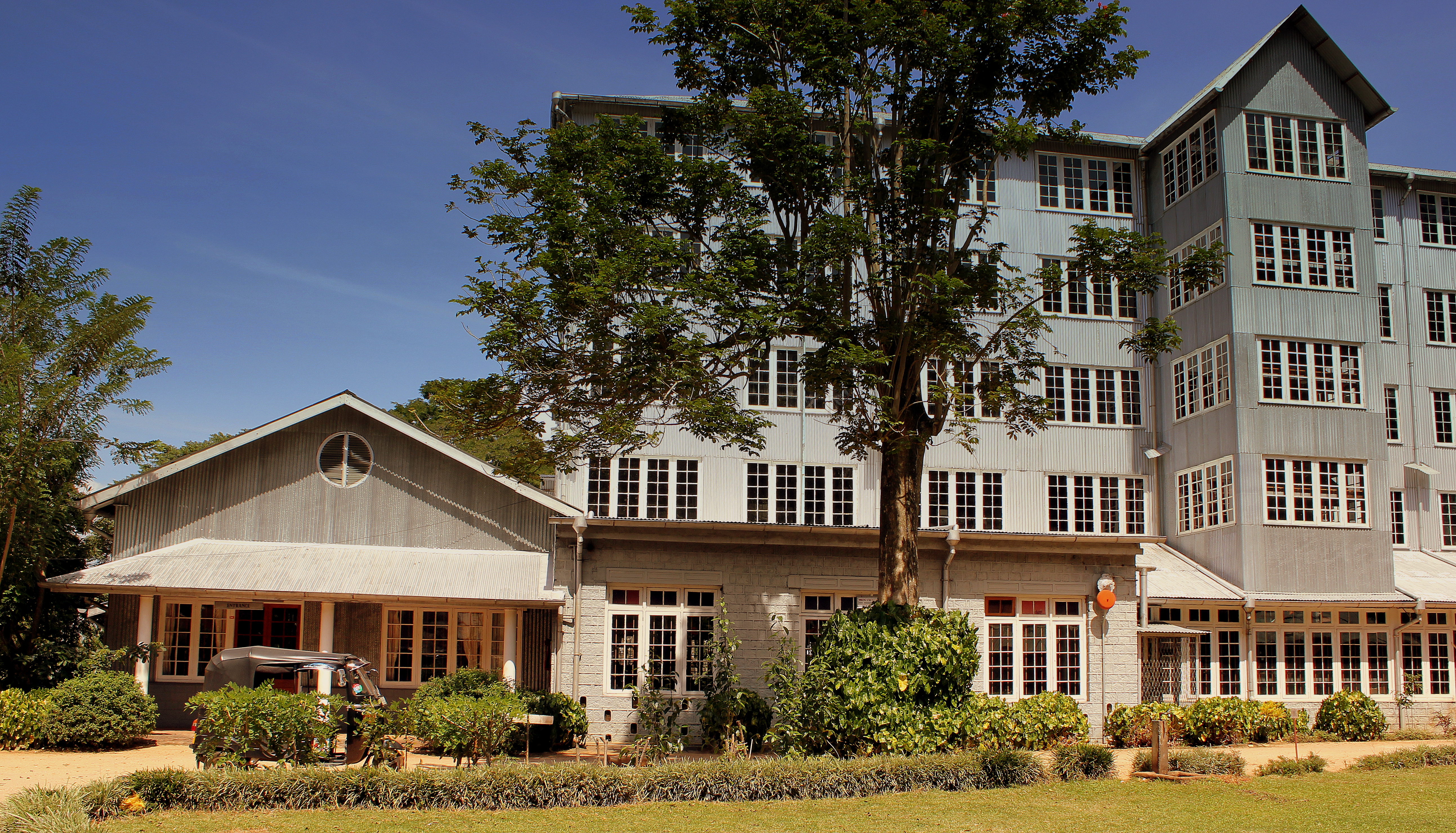 KANDY TEA MUSEUM KANDY TOWN SRI LANKA JAN 2013